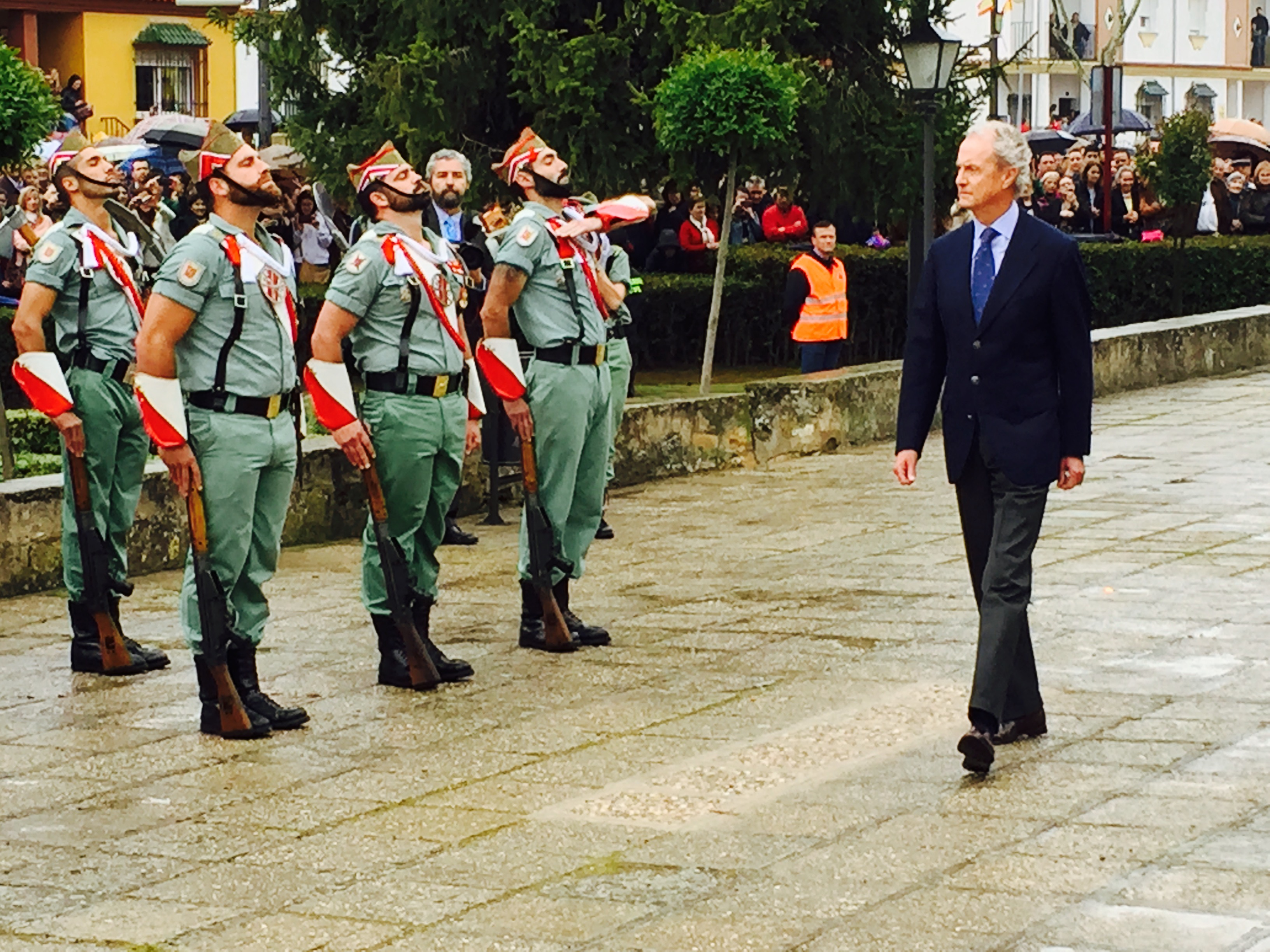 EL Sr. Ministro de Defensa pasa revista a la formación.